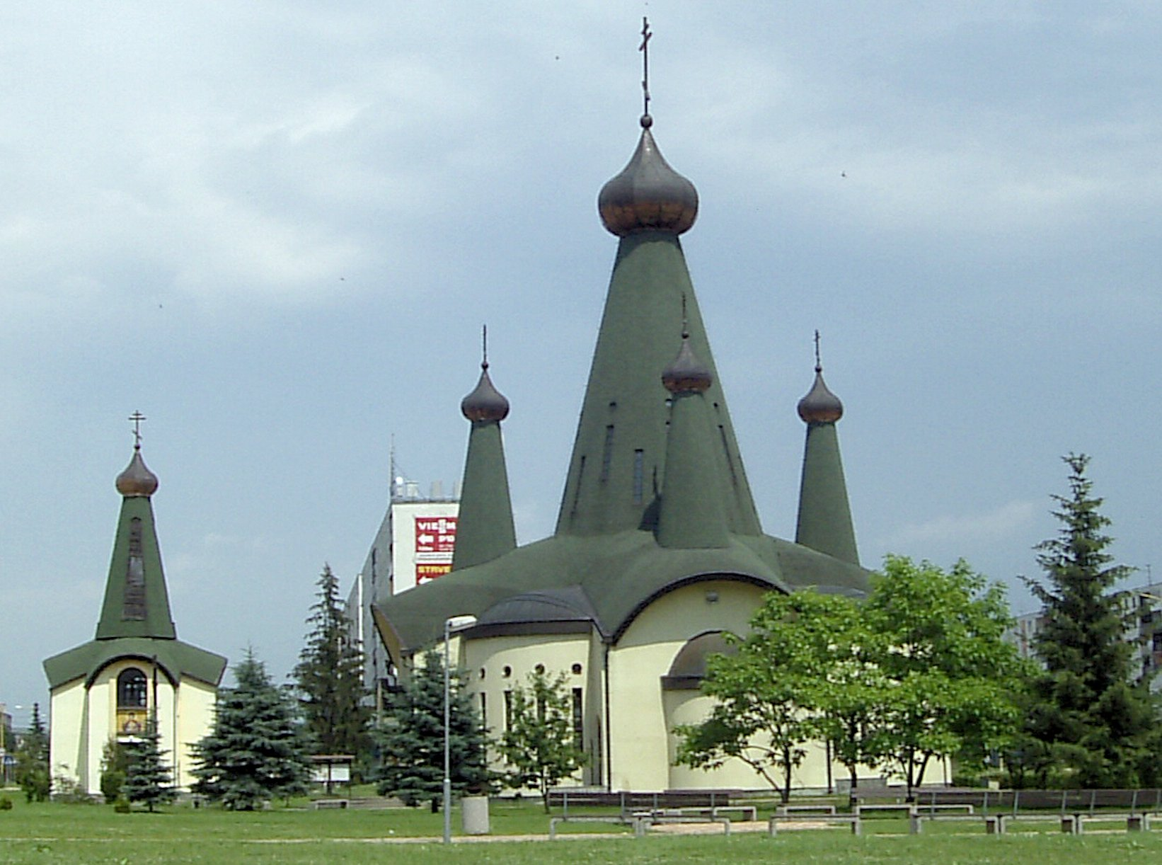 Pravoslavny chrám Svidník